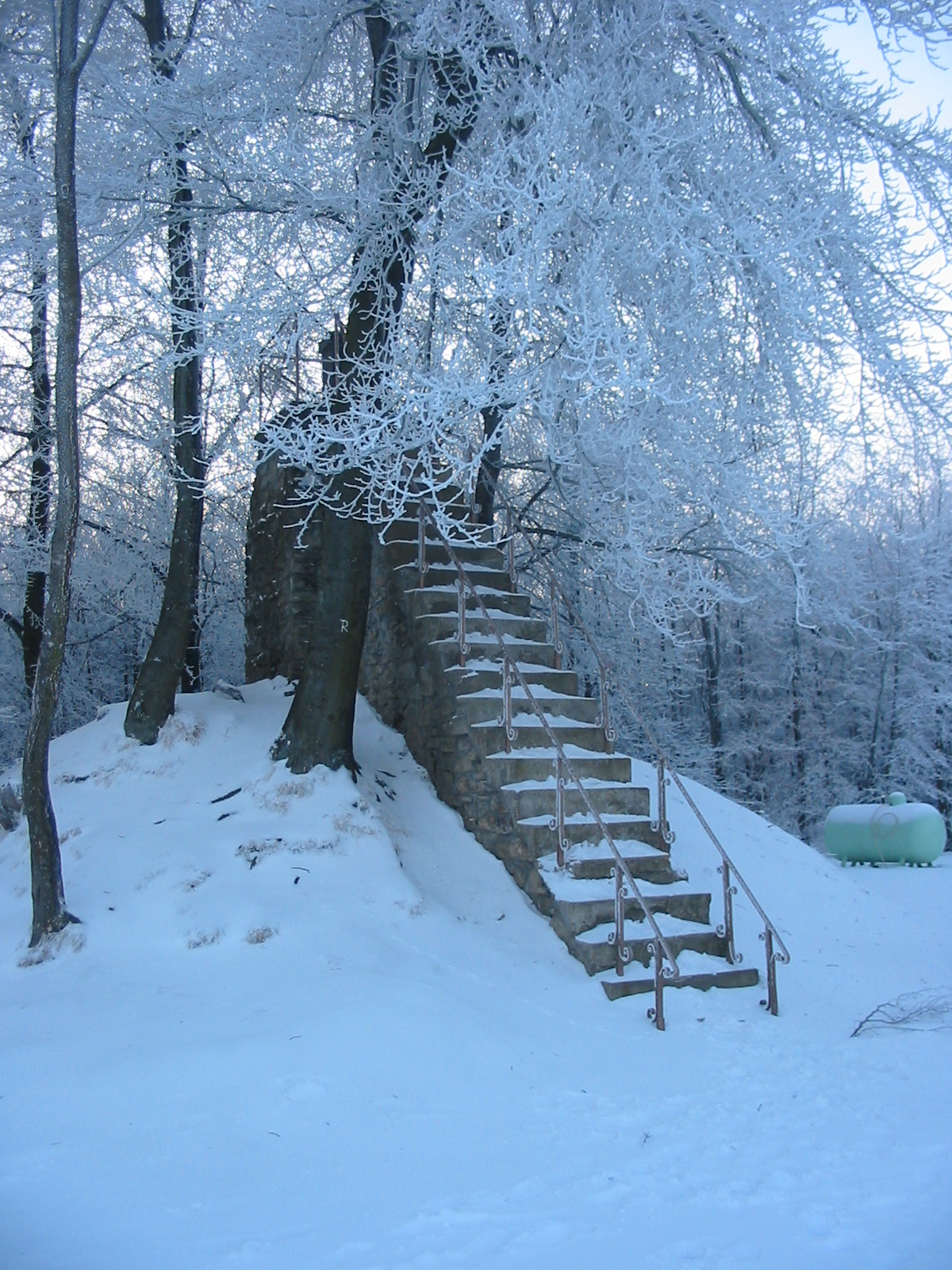 Belgium, Botrange, Monument